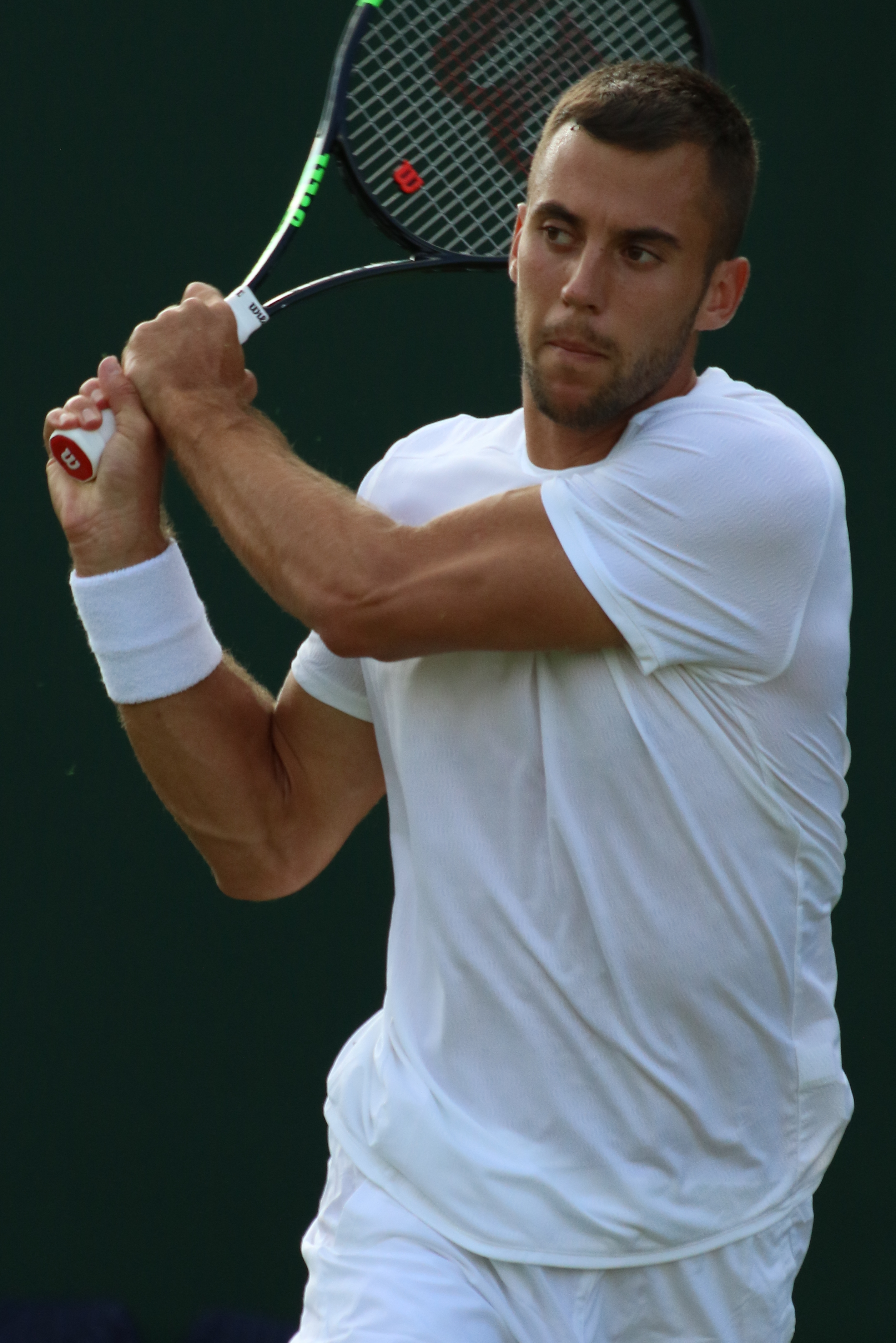 Djere WM19 (25)